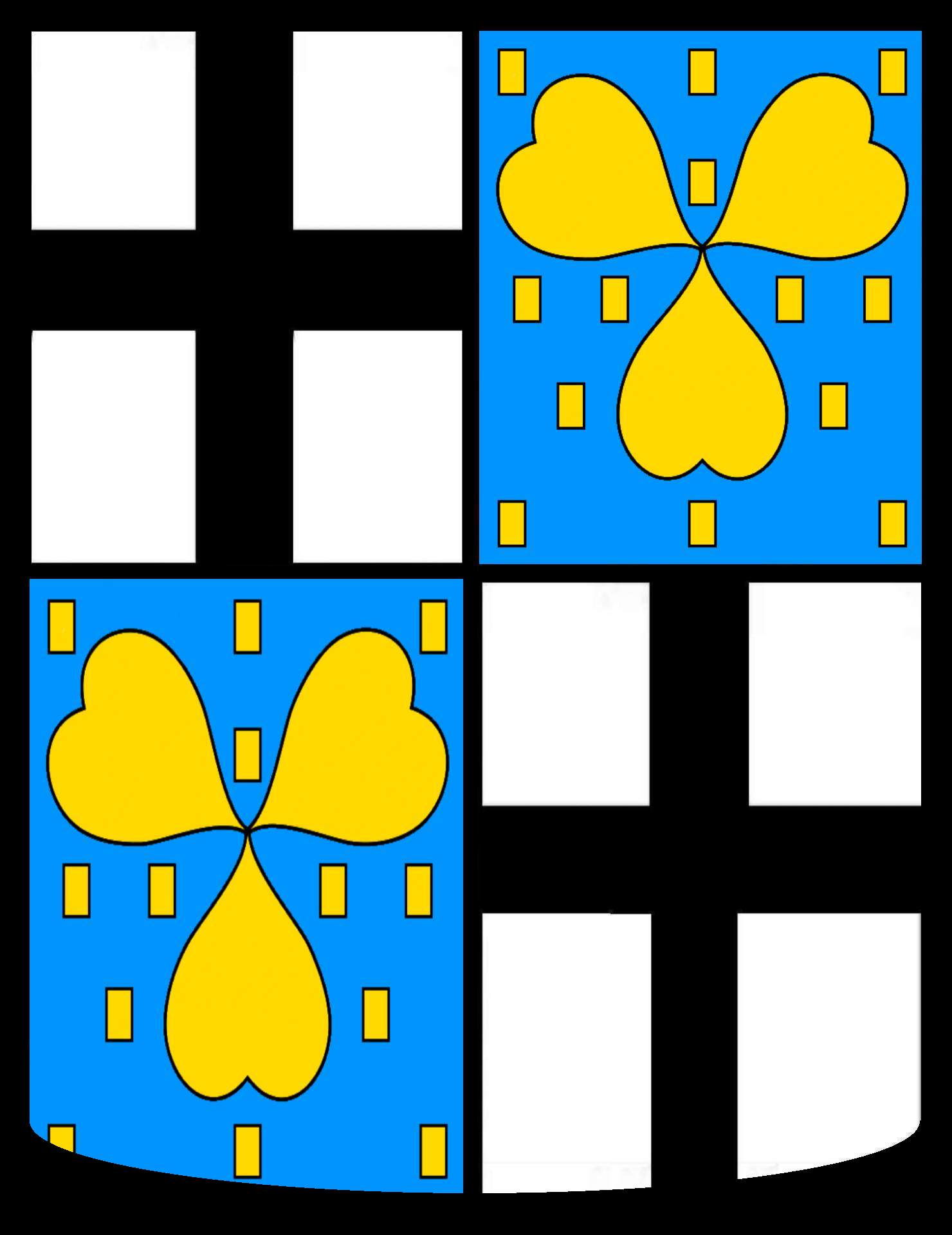 Wappen Balthasar von Dernbach (gen.Grauel) Fürstabt von Fulda 1570–1606